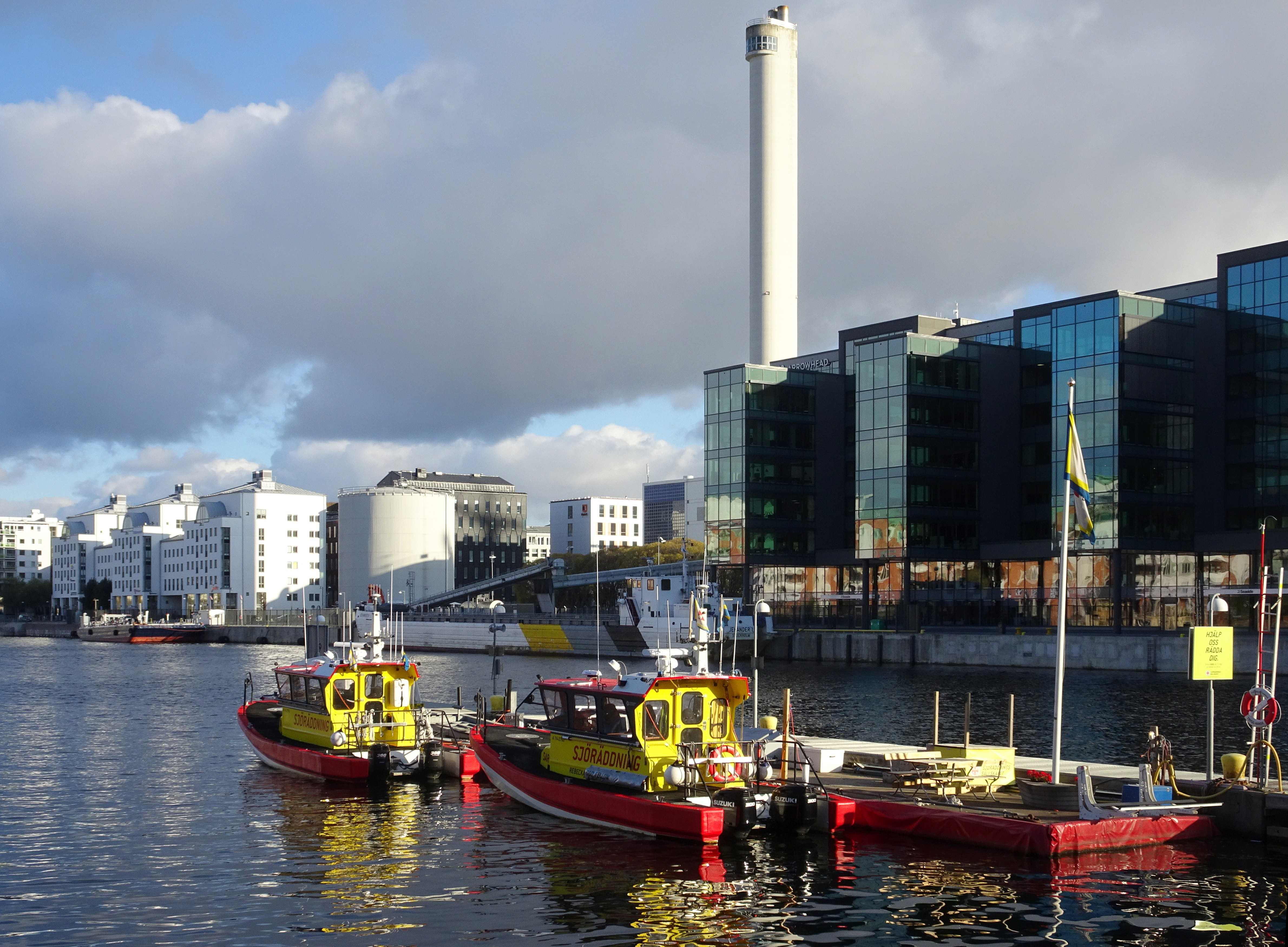 Hammarby sjöstad, södra sidan sedd från Skansbron, Sthlm Seaside till höger